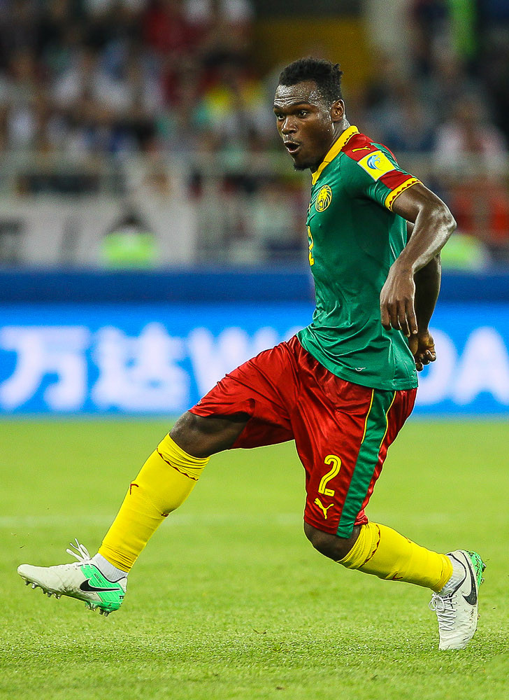 Камерун - Чили